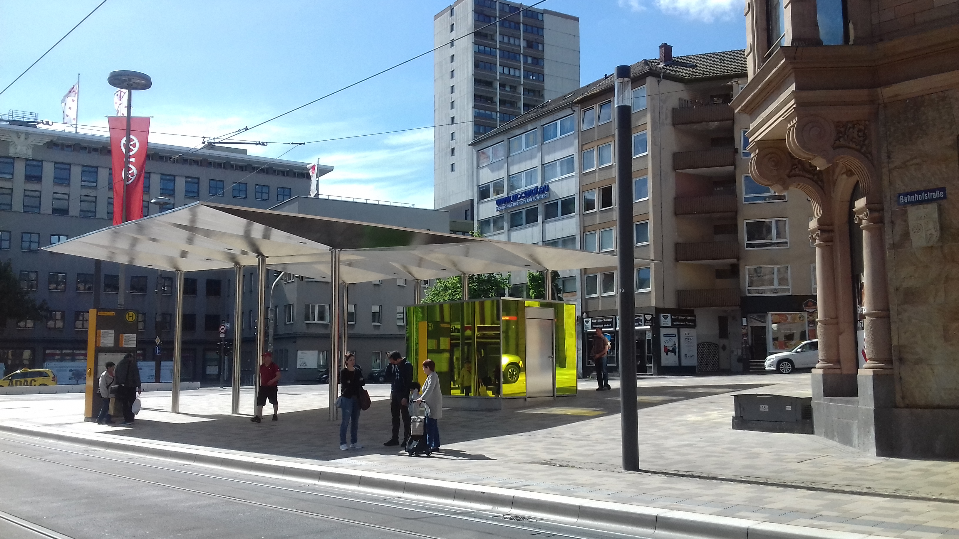 Die neugestaltete Haltestelle Münsterplatz in der Mainzer Innenstadt